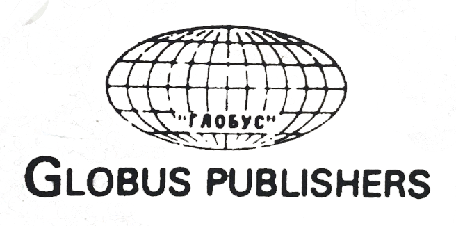 Publisher's mark printed by Azar on back covers of books